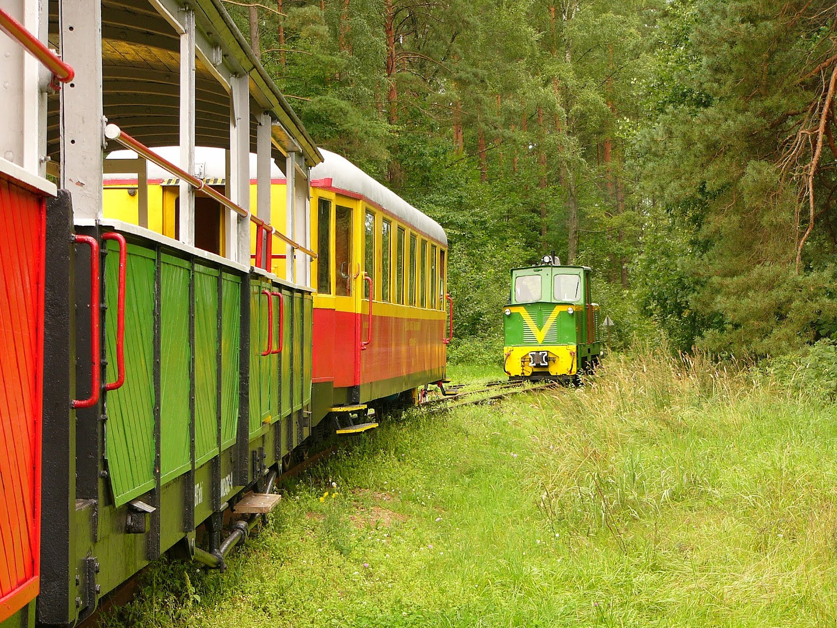 Ełcka Kolej Dojazdowa - przestrzenny układ komunikacyjny. Sprzęganie w Sypitkach (zabytek nr A-3194).